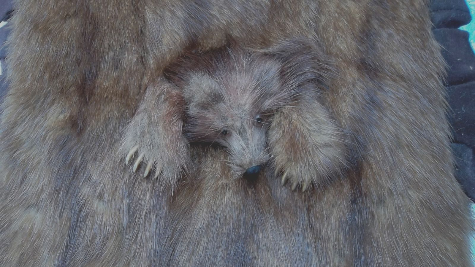 Muff aus Zobelfell. Wahrscheinlich gut 100 Jahre alt. Mit appliziertem Zobelkopf und Vorderpfoten, sowie drei Zobelschweifen.